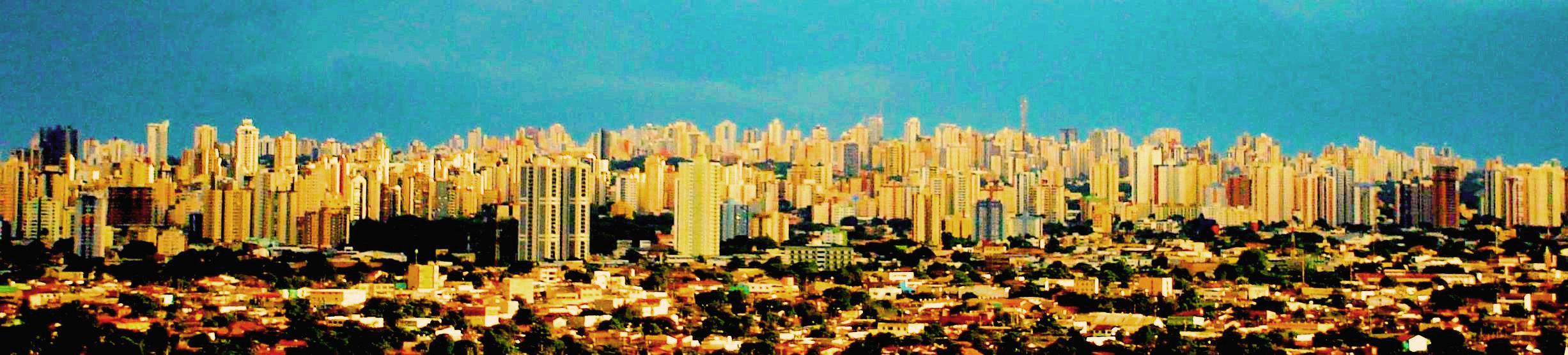 Skyline, Goiânia-GO, Brazil (from Av. Perimetral Norte)